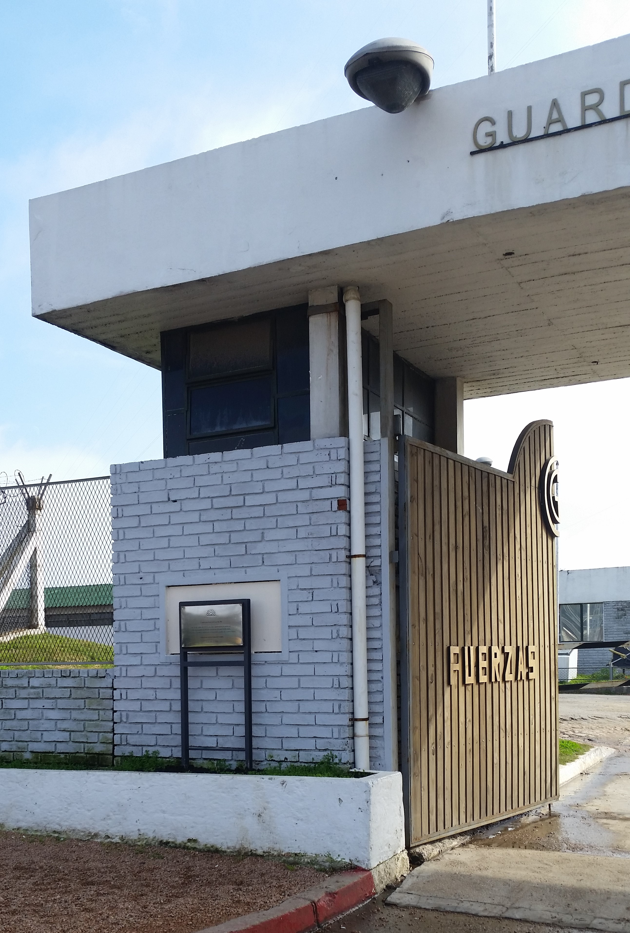 Texto de la placa: «Comisión Especial Ley 18.596 El 31 de julio de 1975, en esta dependencia policial, fue asesinado mediante torturas Álvaro Balbi Sala, trabajador, músico, militante comunista, padre de cuatro hijos. Nunca más terrorismo de Estado 31 de julio de 2018»